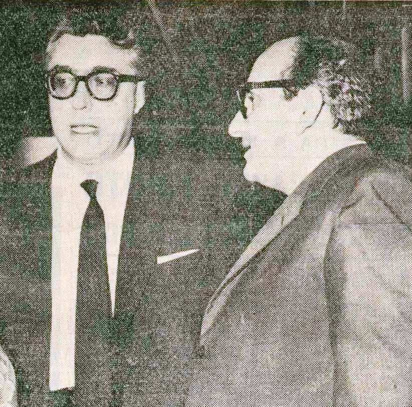 Gli scrittori Vasco Pratolini e Luigi Silori